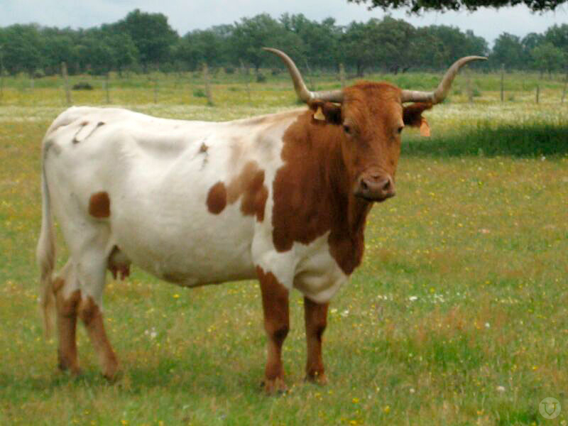 Imagen en primavera de un ejemplar de vaca berrenda en colorado. Fotografía tomada en la Dehesa de Valdelazarza (Salamanca)